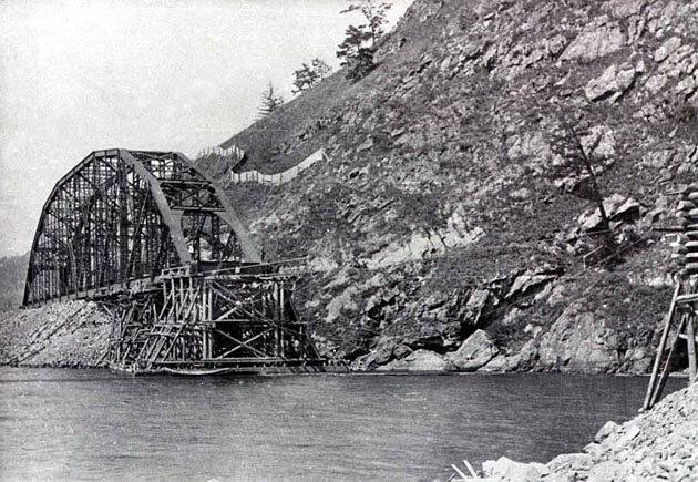 Строительство моста в Берёзовской бухте